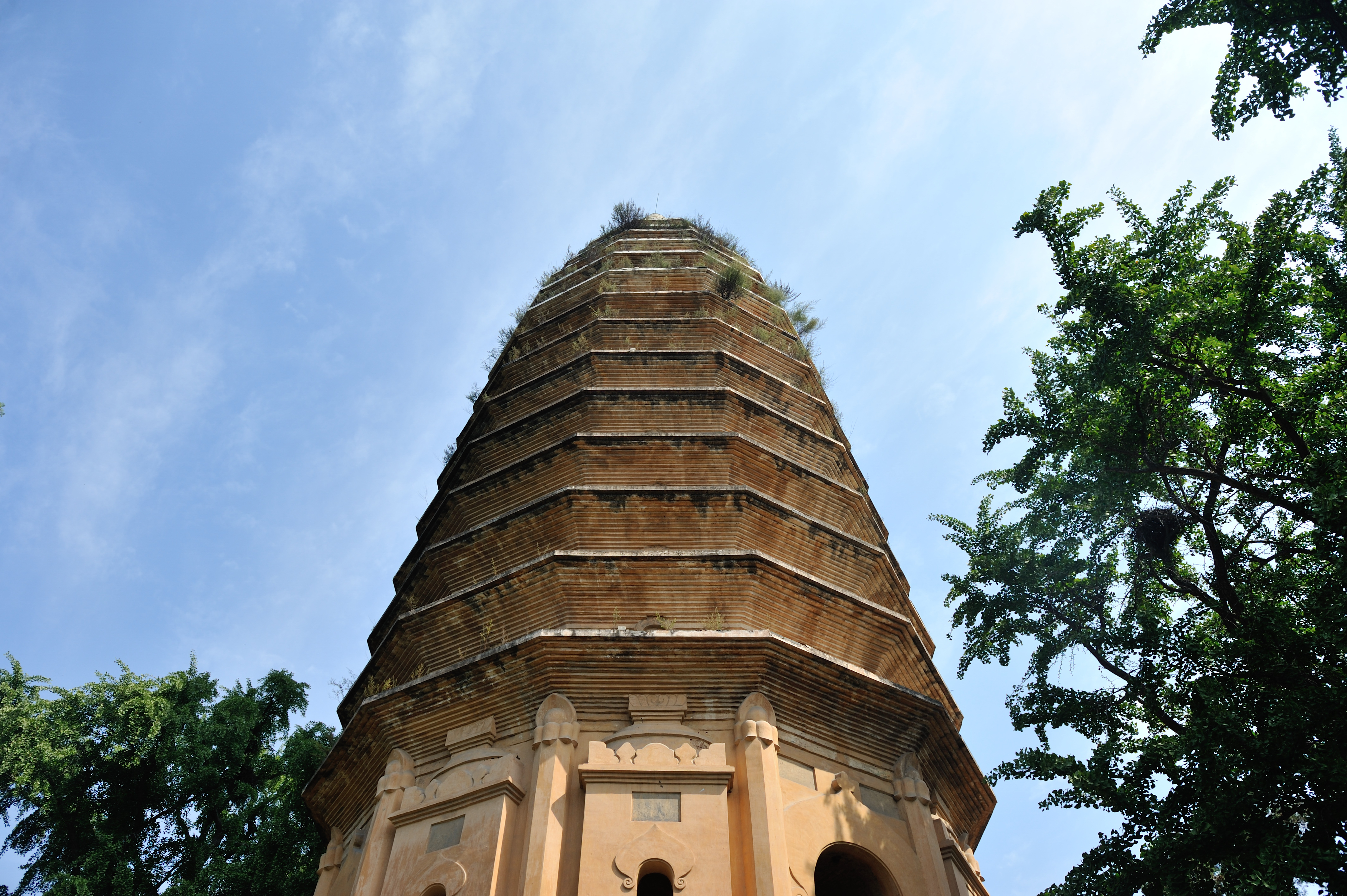 登封嵩岳寺塔